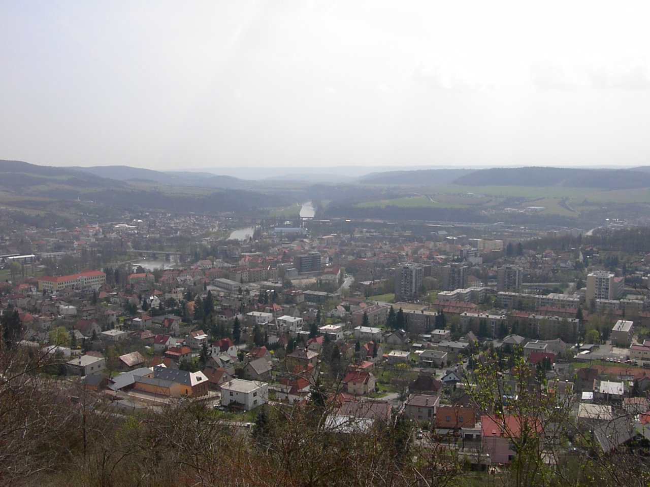 Výhled na Beroun od severu.